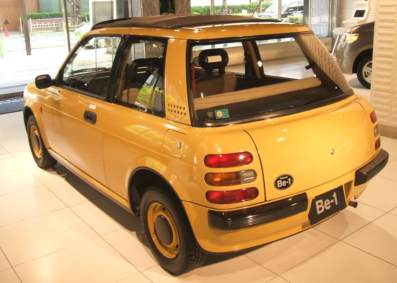 Nissan Be-1